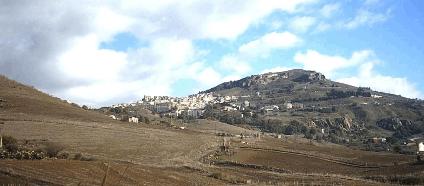 panorama di Alia